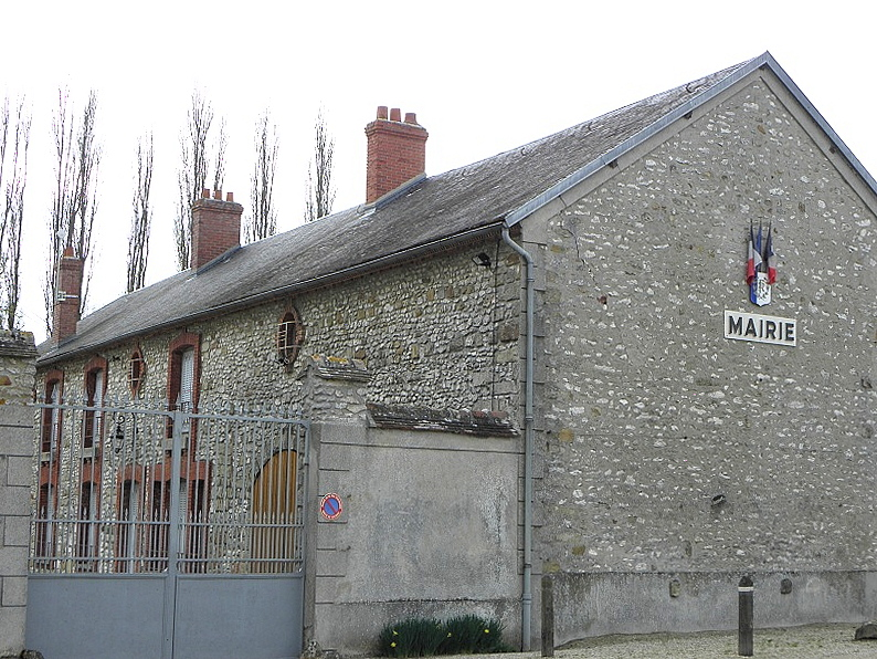 Mairie de Lizines (77).